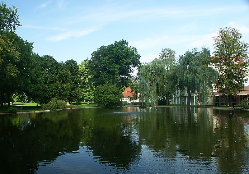 Kurpark von Bad Hersfeld, rechts hinter den Bäumen ist die Klinik im Kurpark und im Hintergrund das Kurhaus zu sehen.